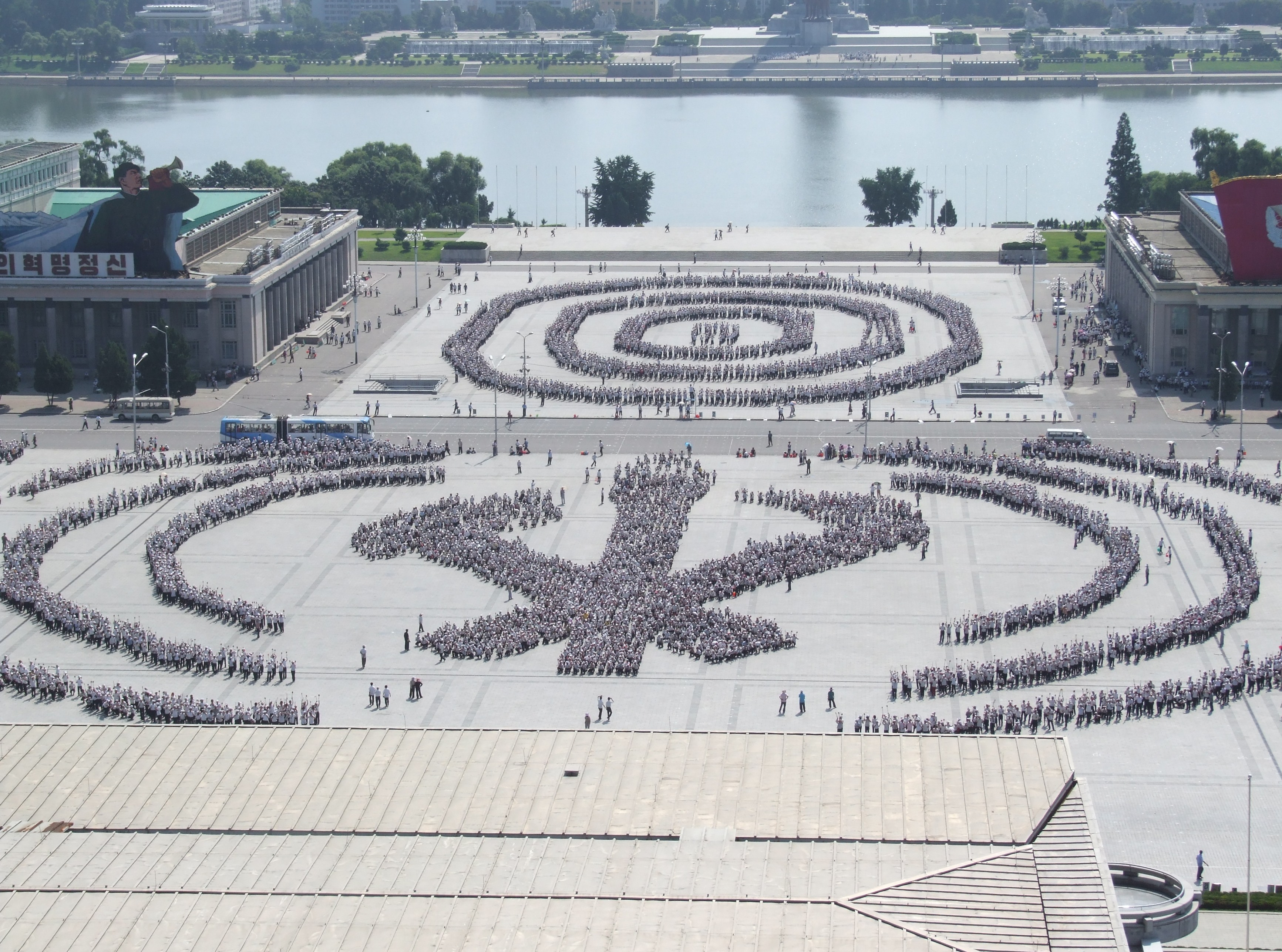 Kinder proben einen Fackelmarsch auf dem Kim-Il-sung-Platz in Pjöngjang